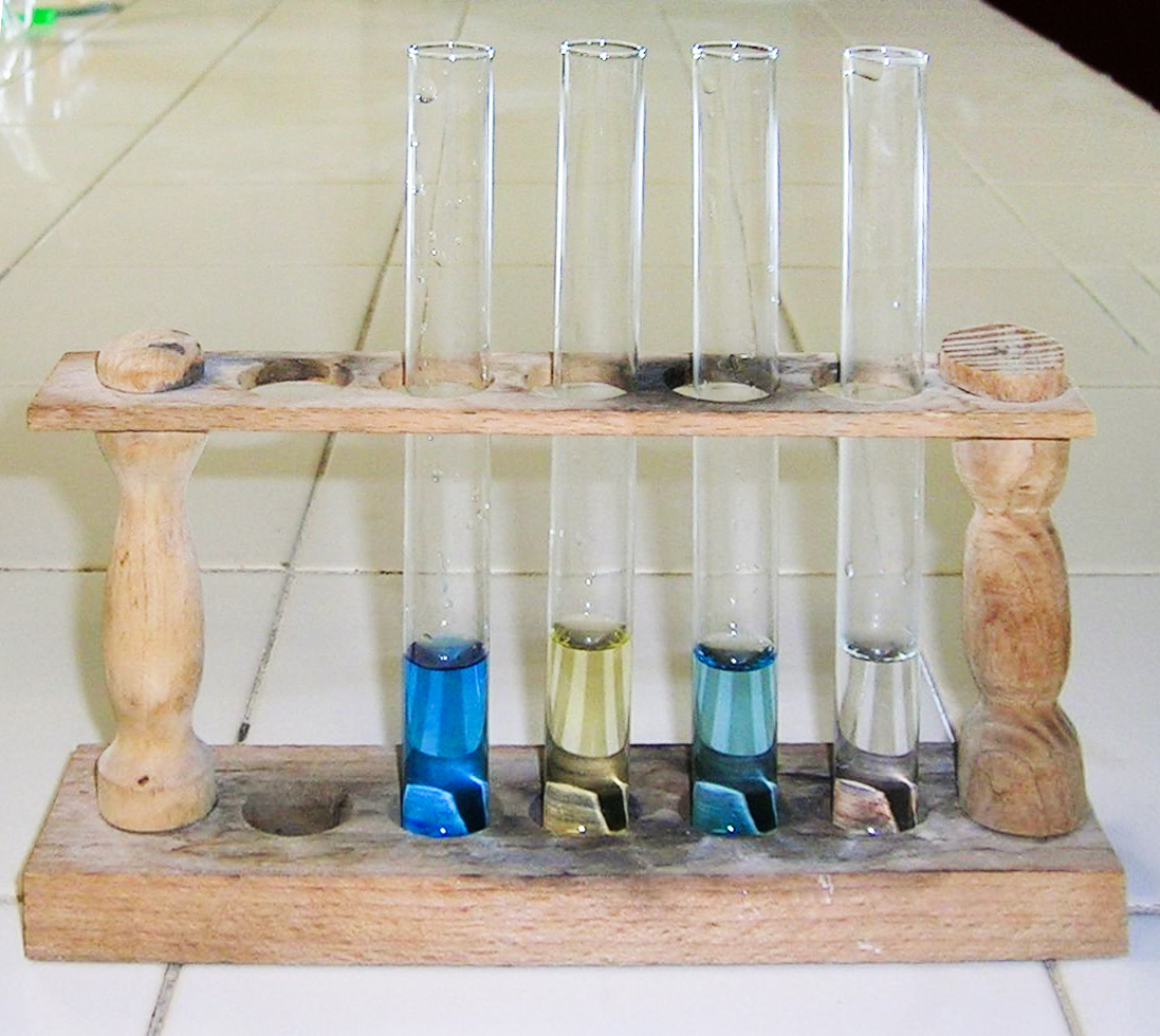 4 tubes à essais et support.jpg